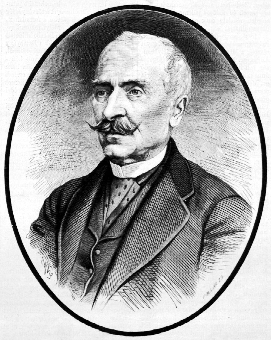 Mikó Imre (1805–1876) politikus, miniszter, történetíró, a Magyar Tudományos Akadémia igazgatósági és tiszteleti tagja portréja. Pollák Zsigmond metszete